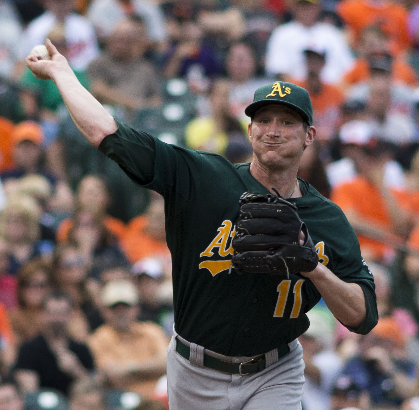 Jarrod Parker